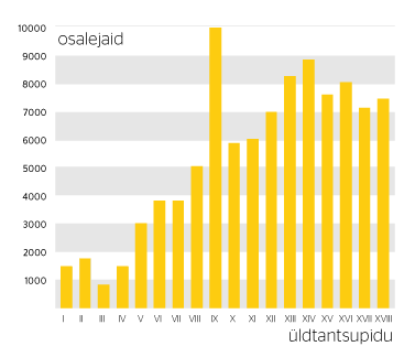 Üldtantsupeod. Graafiline kujutus näitamaks osavõttu üldtantsupidudest